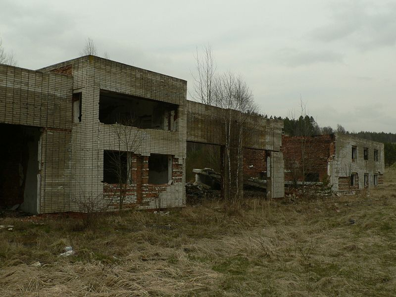 Svébořice, Ralsko, Czech Republic, Soviet Army building